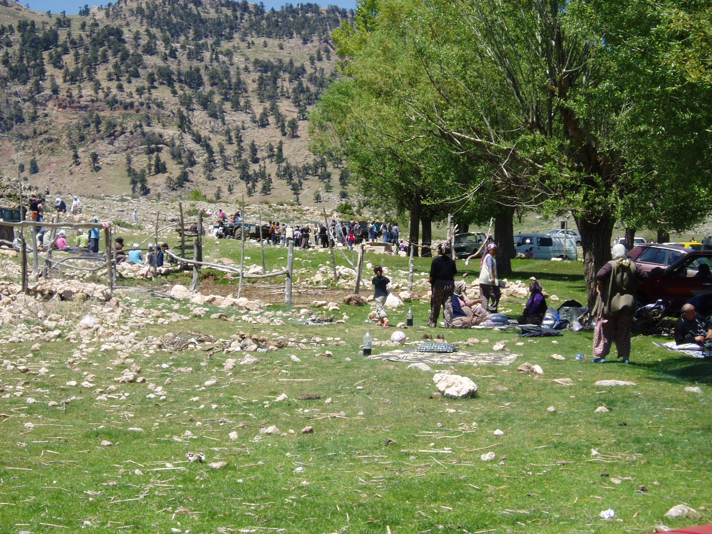 hıdır ellez şenlikleri özpak